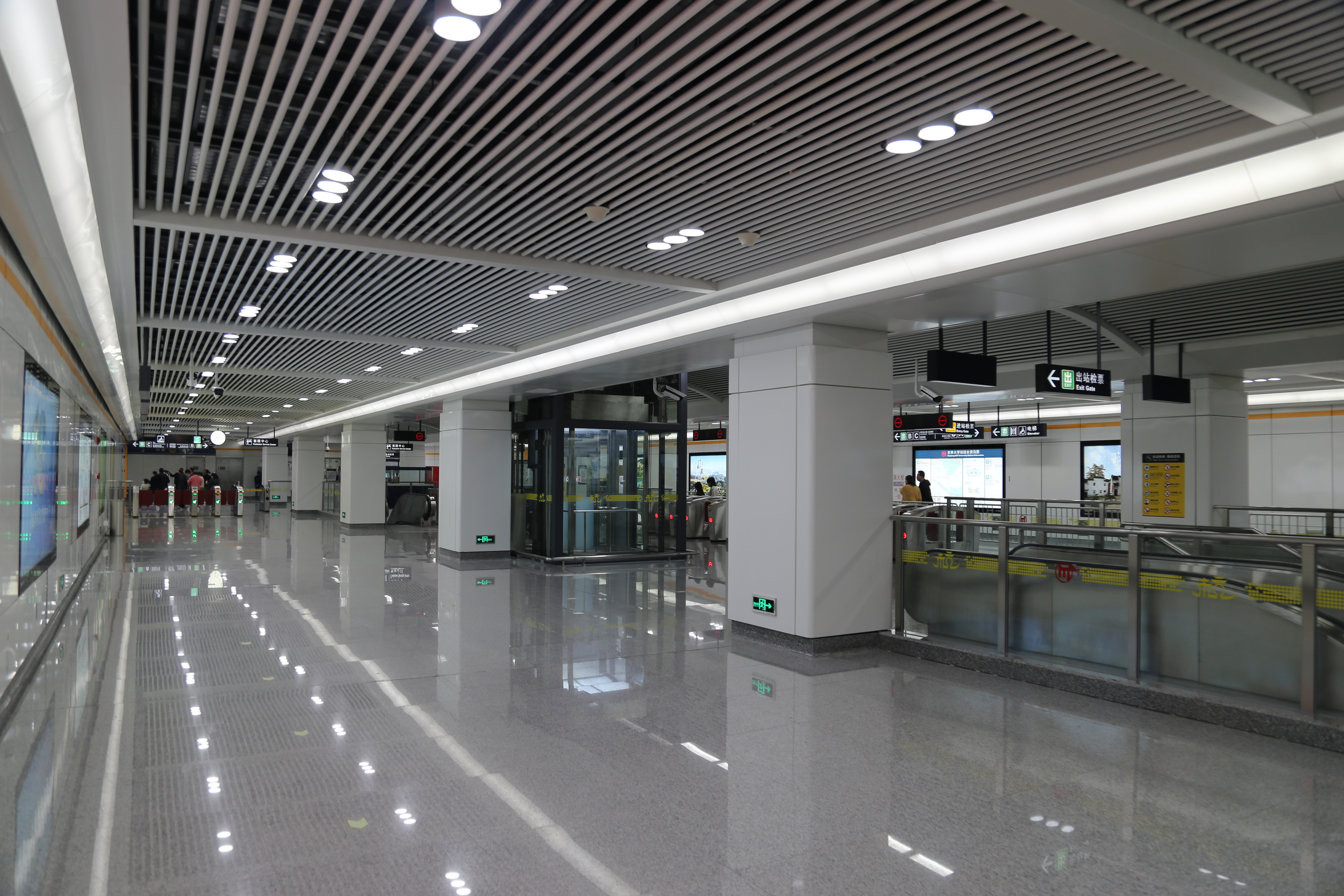 农林大学站站厅